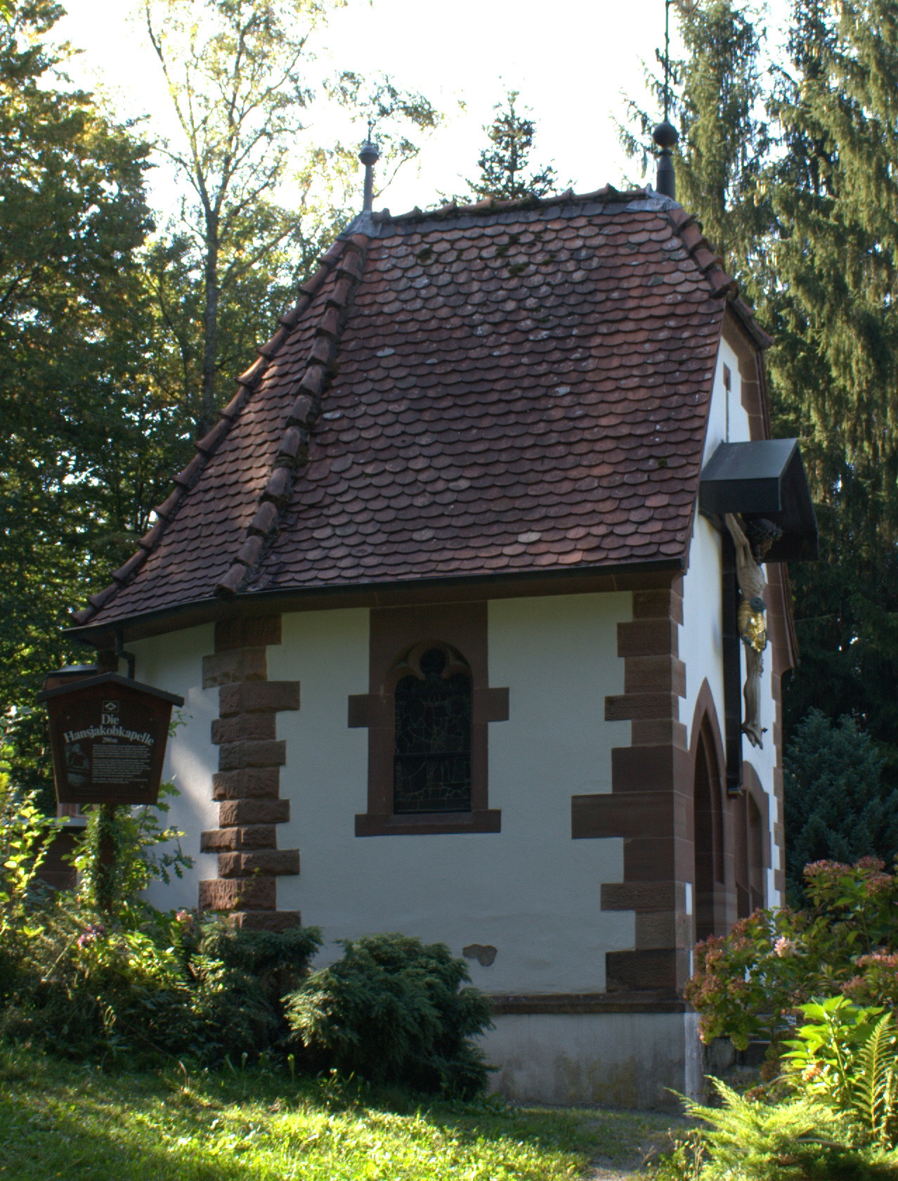 Grabkapelle für Heinrich Hansjakob in Hofstetten im Schwarzwald, Baden-Württemberg; erbaut 1901-1903 nach Entwurf des Architekten Max Meckel